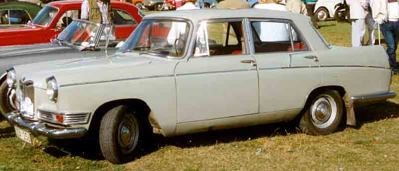 Riley 4-Door Saloon